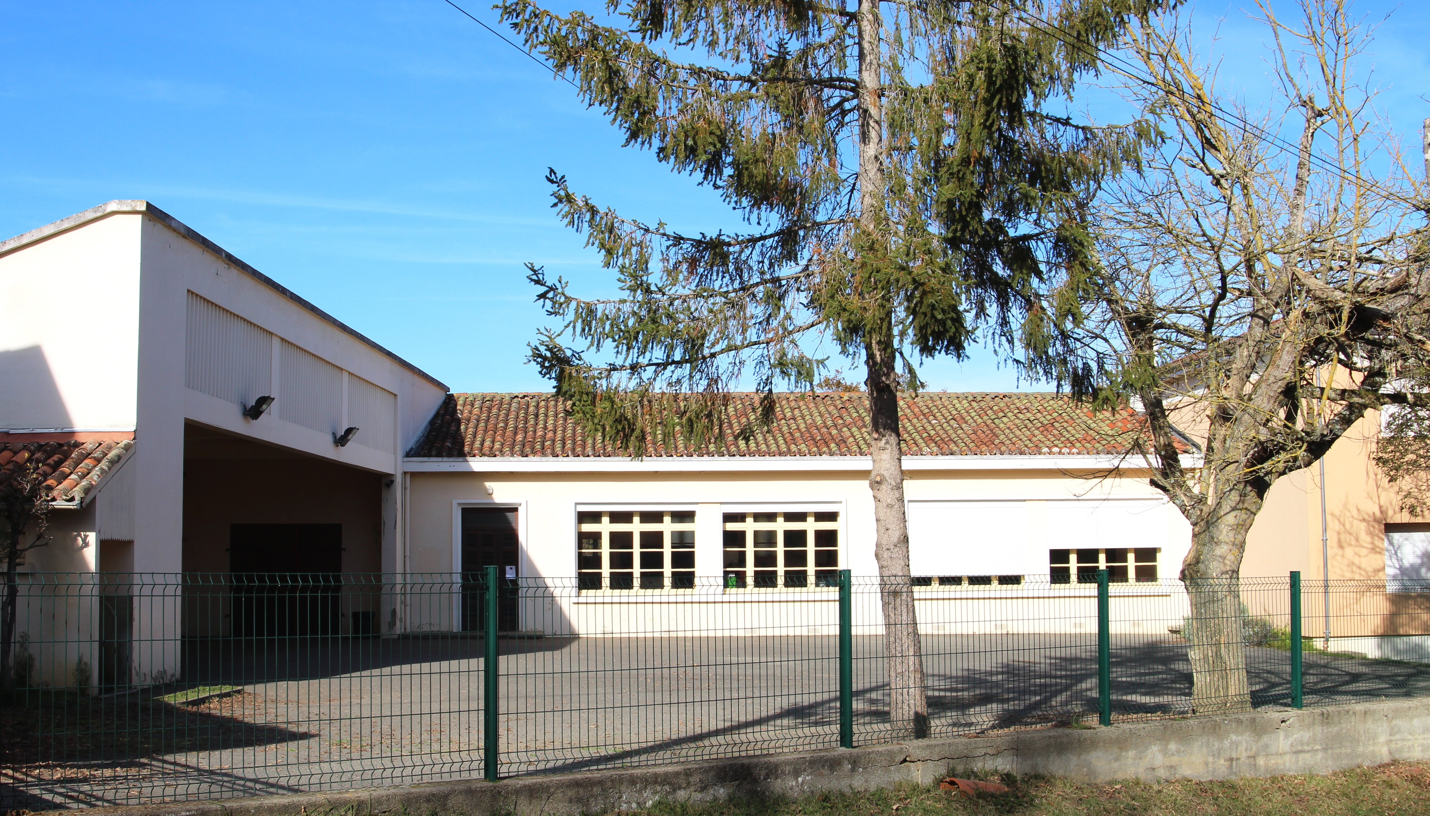 École de Vidouze (Hautes-Pyrénées)